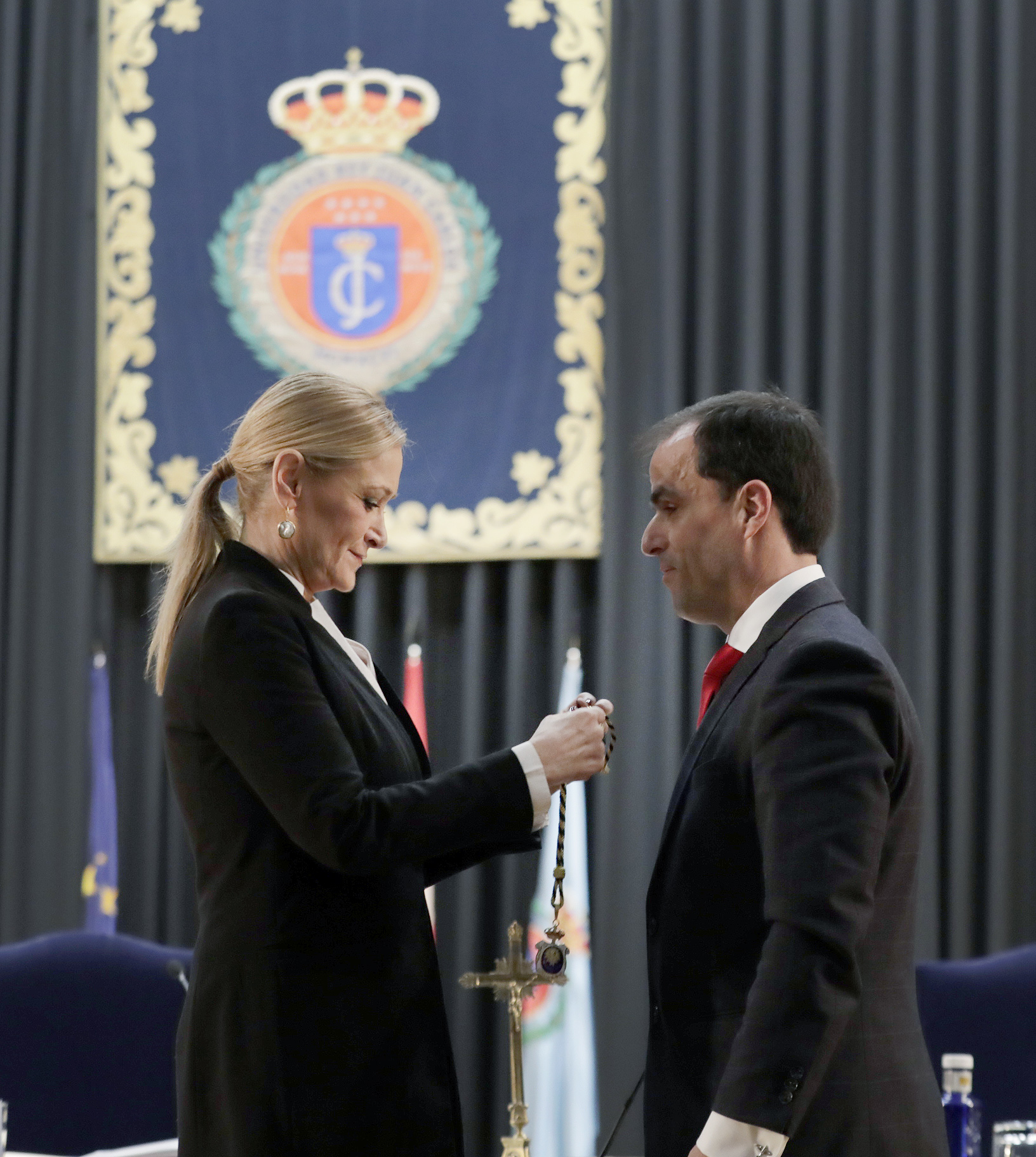 Javier Ramos López Cristina Cifuentes in 2017 Files from Cristina Cifuentes Flickr stream